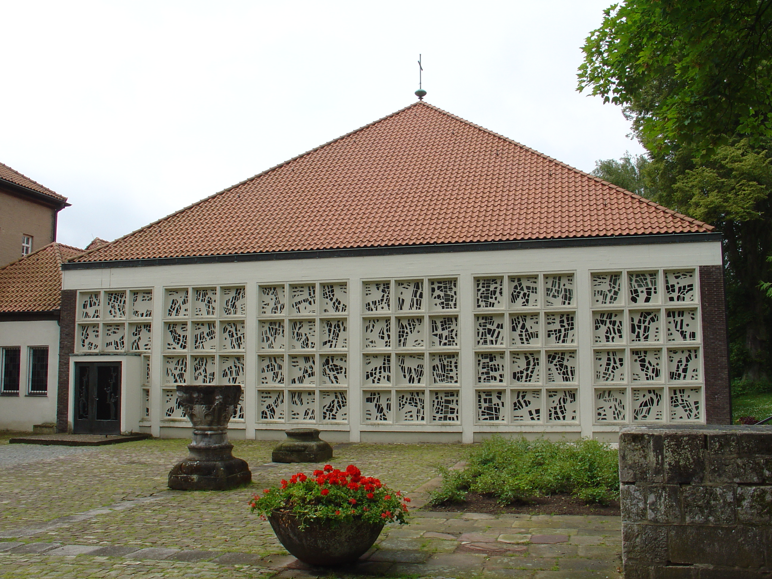 Die neue Kirche im Kloster Hardehausen